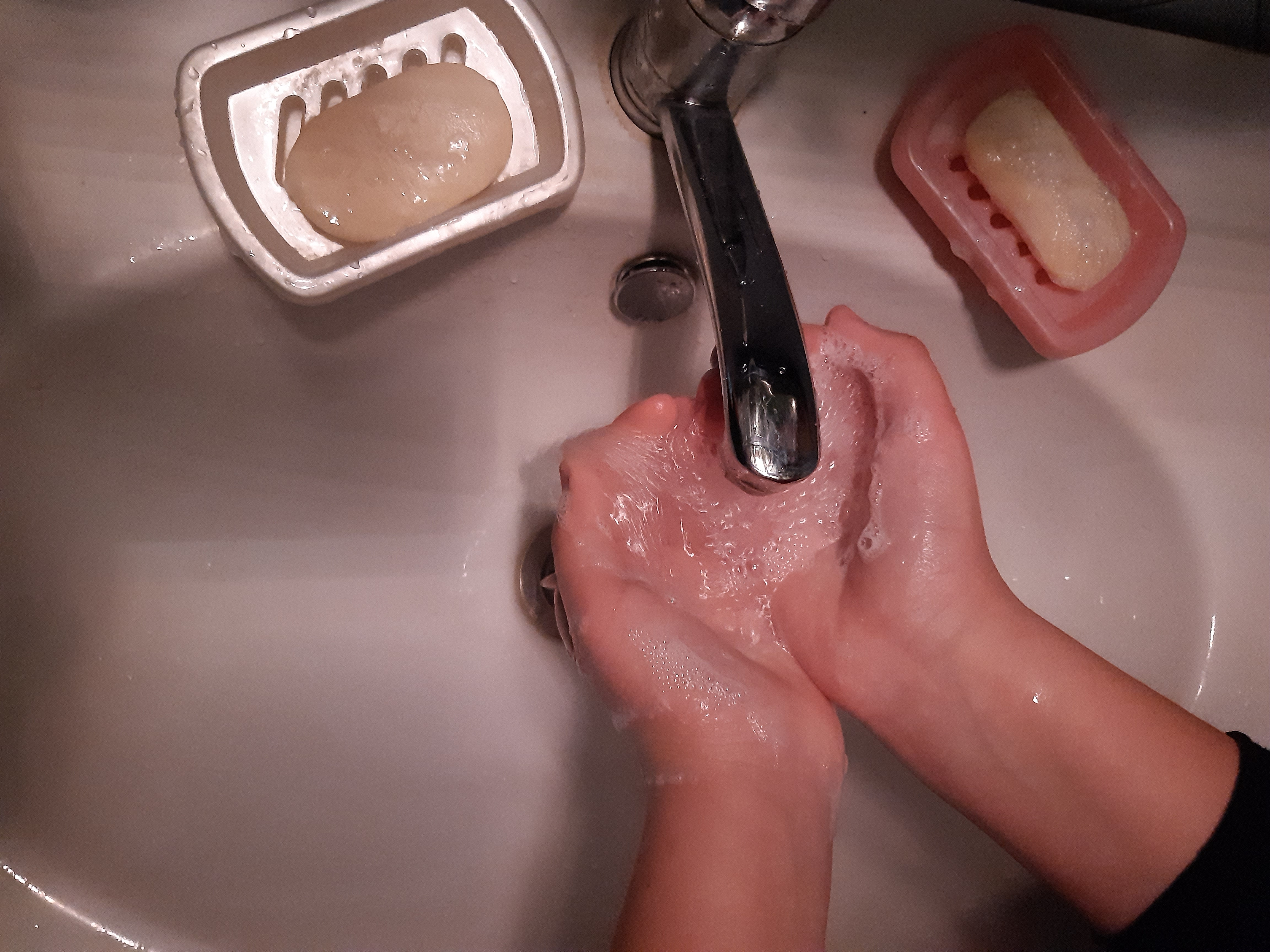 Ձեռքերի լվացում